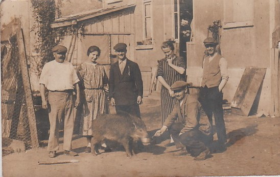 Fermiers de l'Arrouaise réunis à Etreux (Thiérache) pour une scène rustique, circa 1940 (carte postale ancienne).